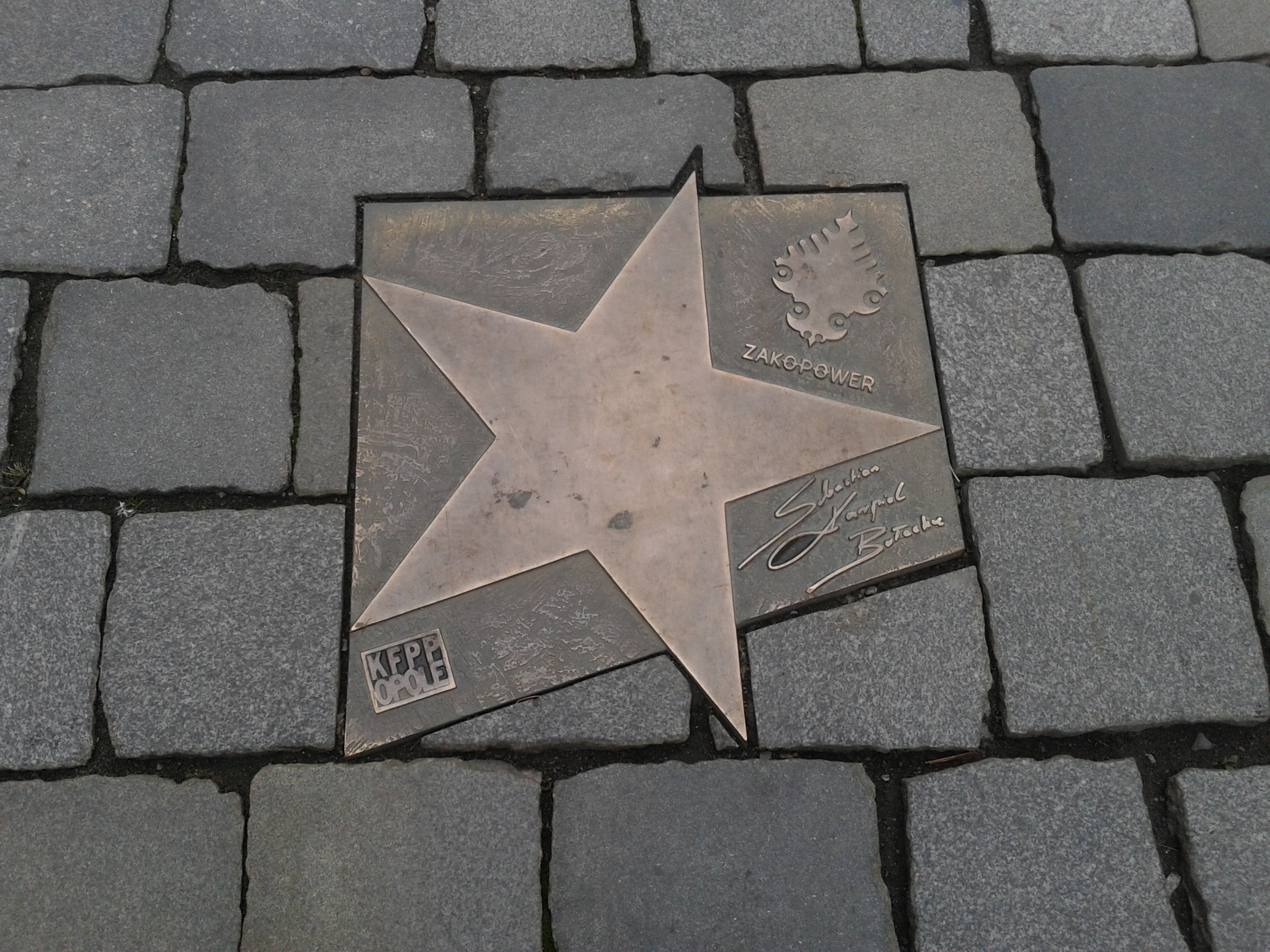 Gwiazda Zakopower w Alei Gwiazd Polskiej Piosenki w Opolu.